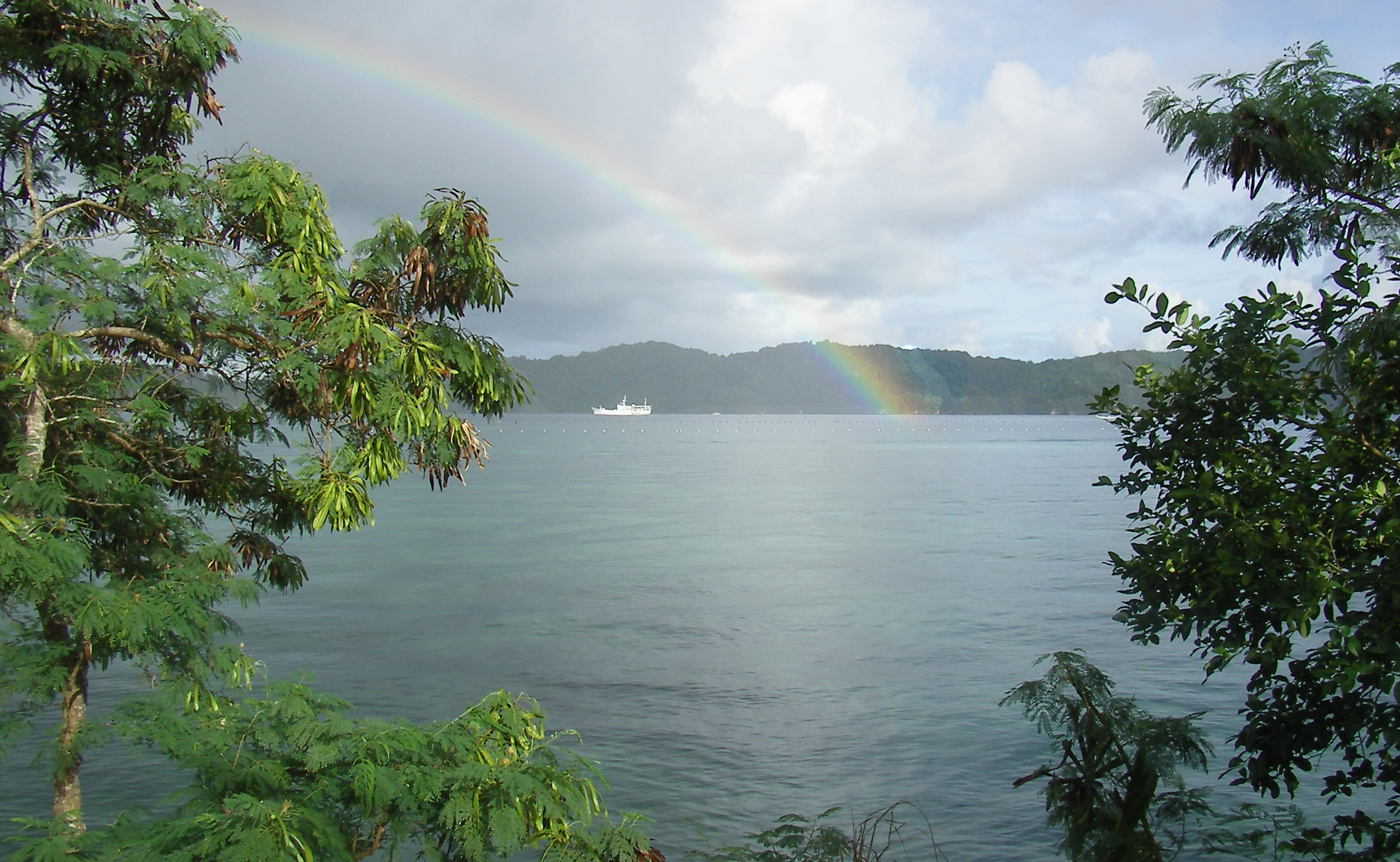 Regenbogen gesehen von Malakal (Koror), häufige Wettererschinung in Palau